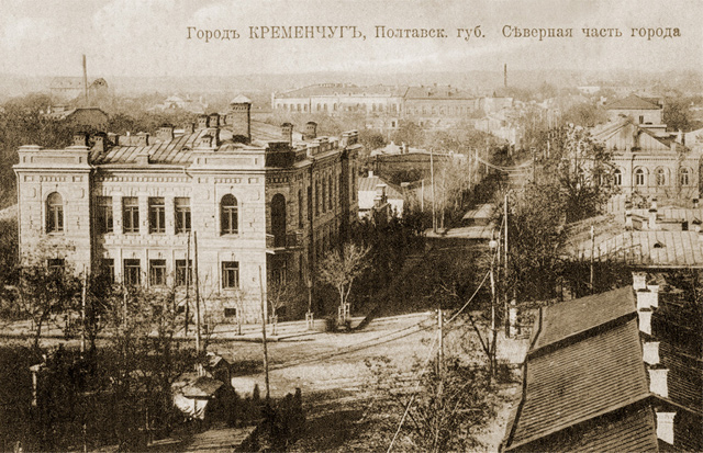 Postcards of old Kremenchuk. Північна частина міста Кременчука.